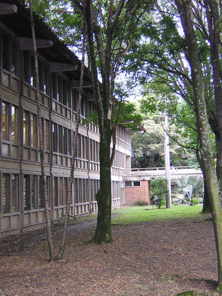 bloque 14, Universidad de Antioquia, Medellín, Colombia (esta foto la tome yo, y la libero al dominio público)